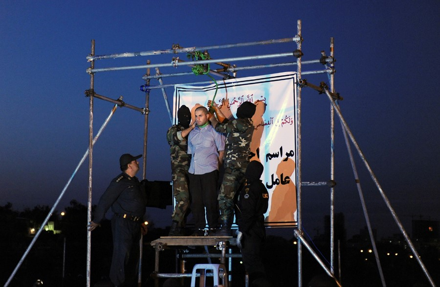 مراسم اعدام کوشا پارسا (عامل جنایت پل مدیریت تهران) به سال 1390